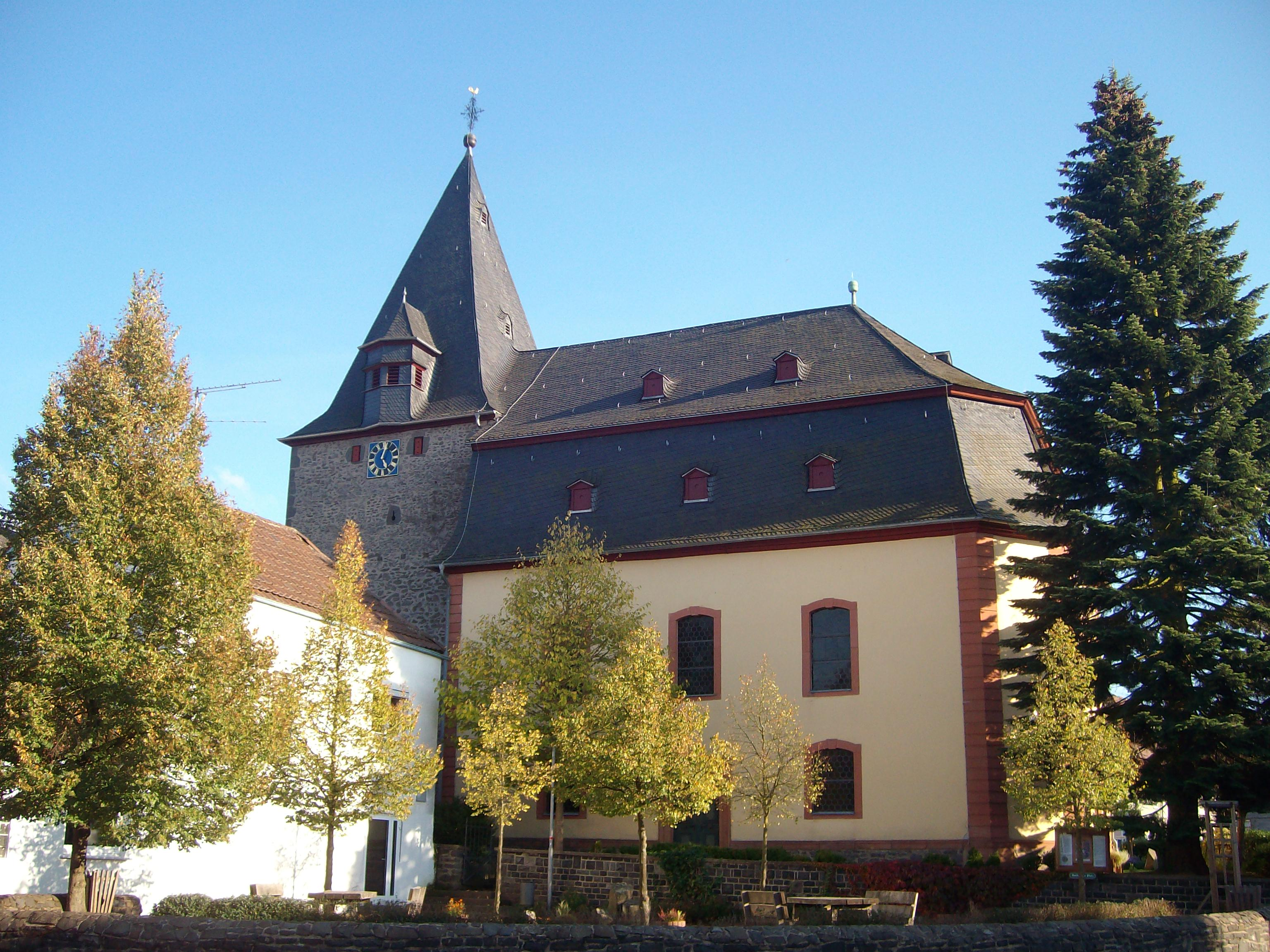 Nordseite der Evangelischen Kirche Freienseen, Laubach, Landkreis Gießen, Hessen, Deutschland